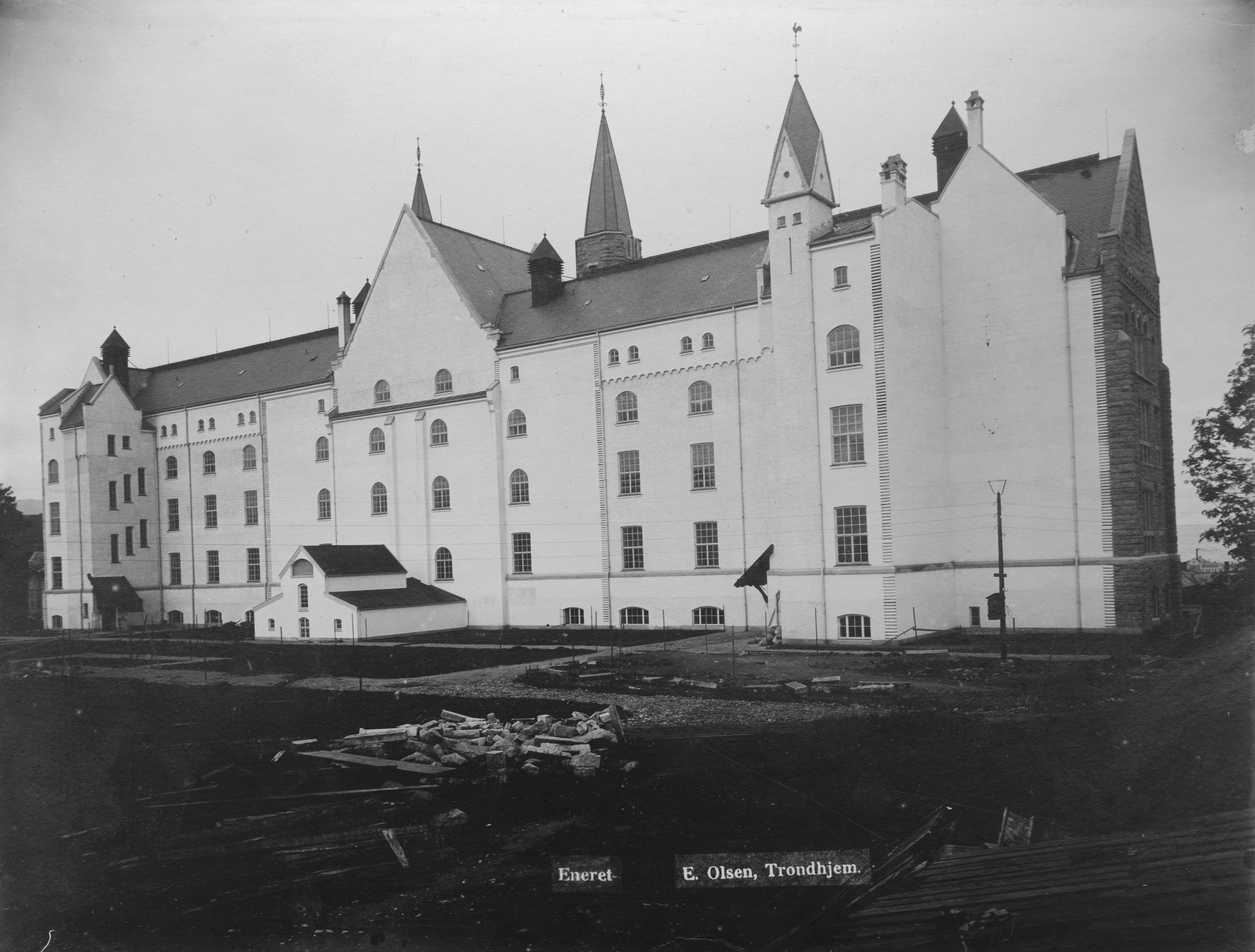 Hovedbygningen på NTH i Trondheim, tegnet av Bredo Greve. Bare nordfløyen var ferdig da bildet ble tatt. Her vises det tydelig at bygningen var hvitkalket/-slemmet på sørsiden